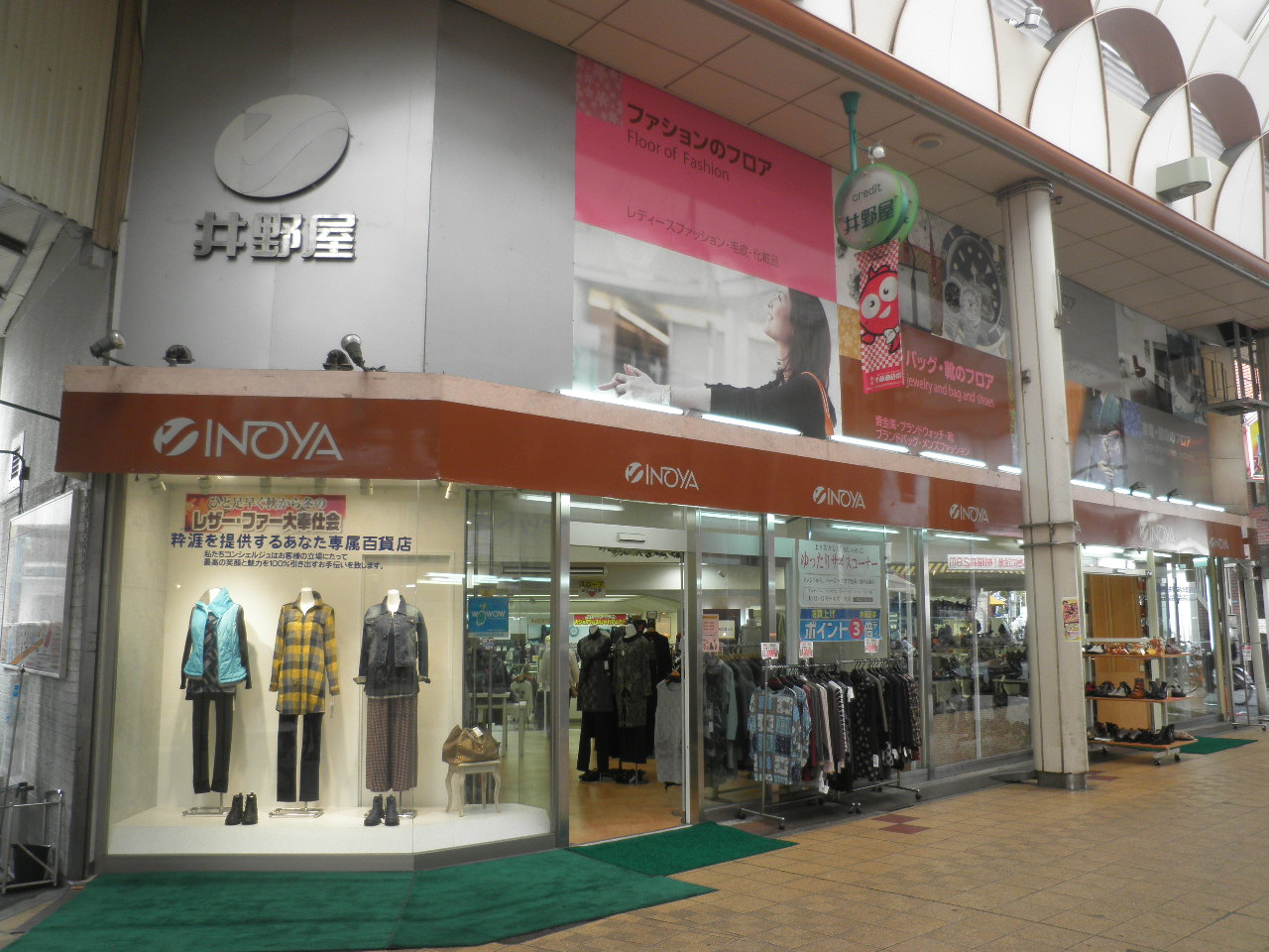 本社が所在する千林店